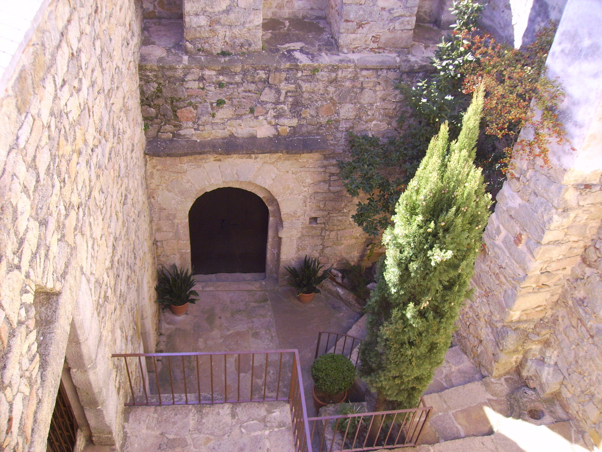 Castell d'Argimon (Riudarenes)